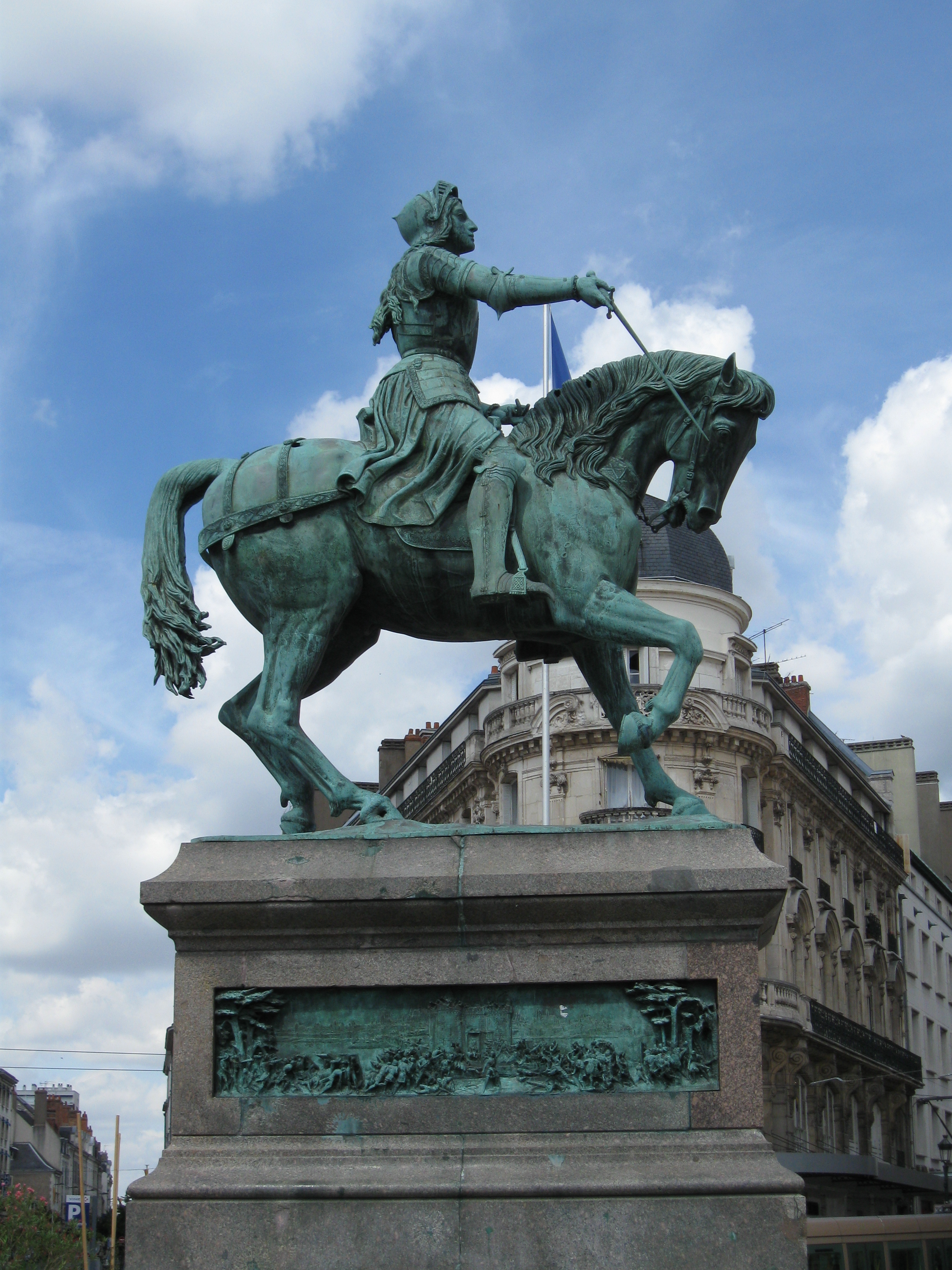 Statue de Jeanne d'Arc par Denis Foyatier, place du Martroi, Orléans, Loiret, France